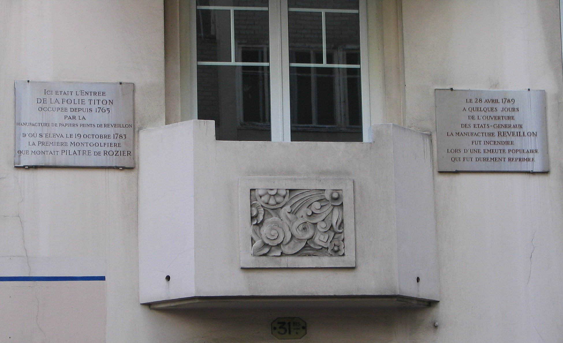 Plaques sur la maison au 31 bis rue de Montreuil dans le Faubourg Saint Antoine à Paris où se trouvait la Folie Titon, fabrique de papier peints, d'où décolla la première montgolfière le 19 octobre 1783 et où commencèrent les émeutes de Paris des 26, 27 et 28 avril 1789 qui amenèrent à la révolution française.